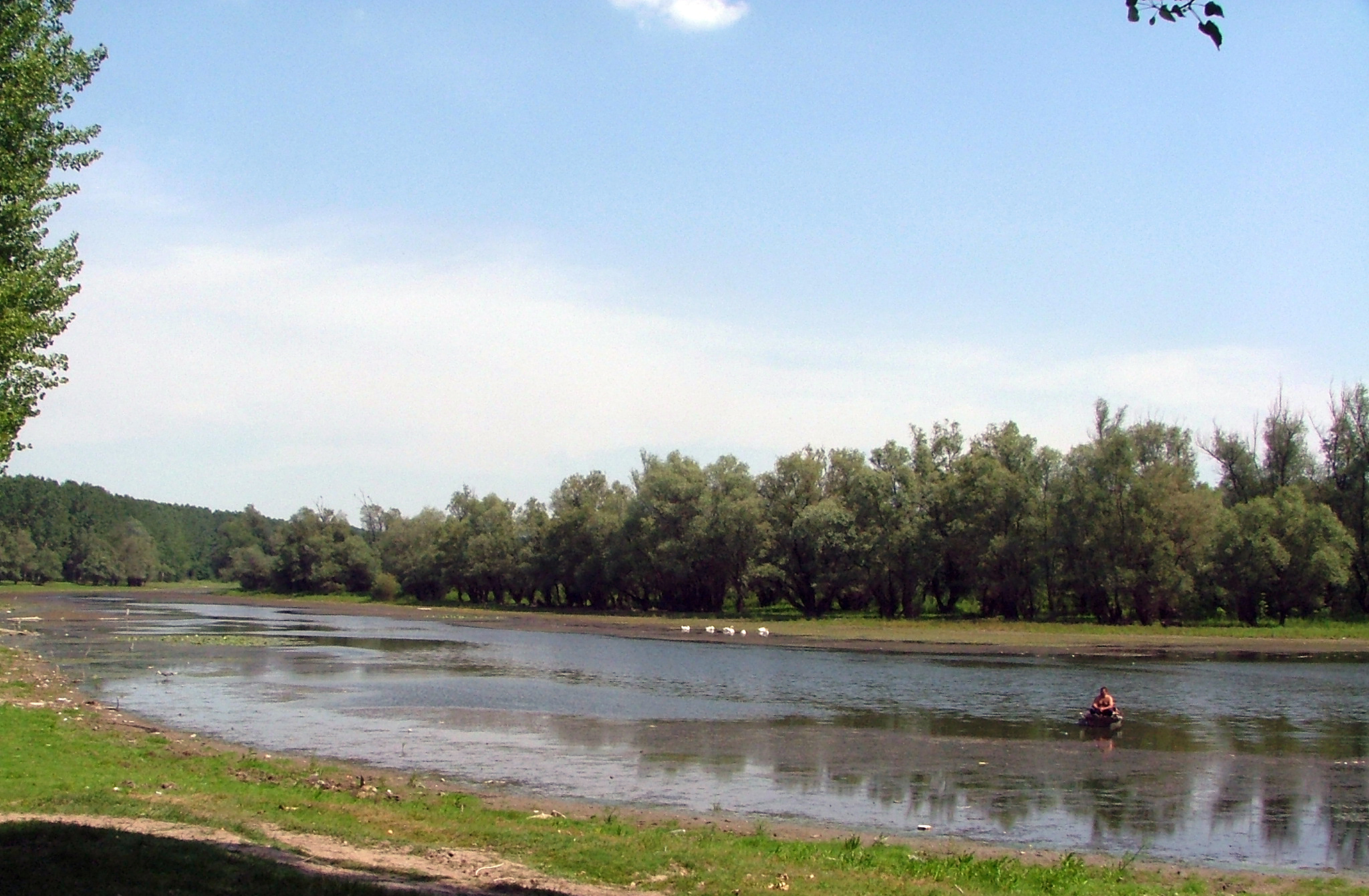 Српски (ћирилица): РС12РП28